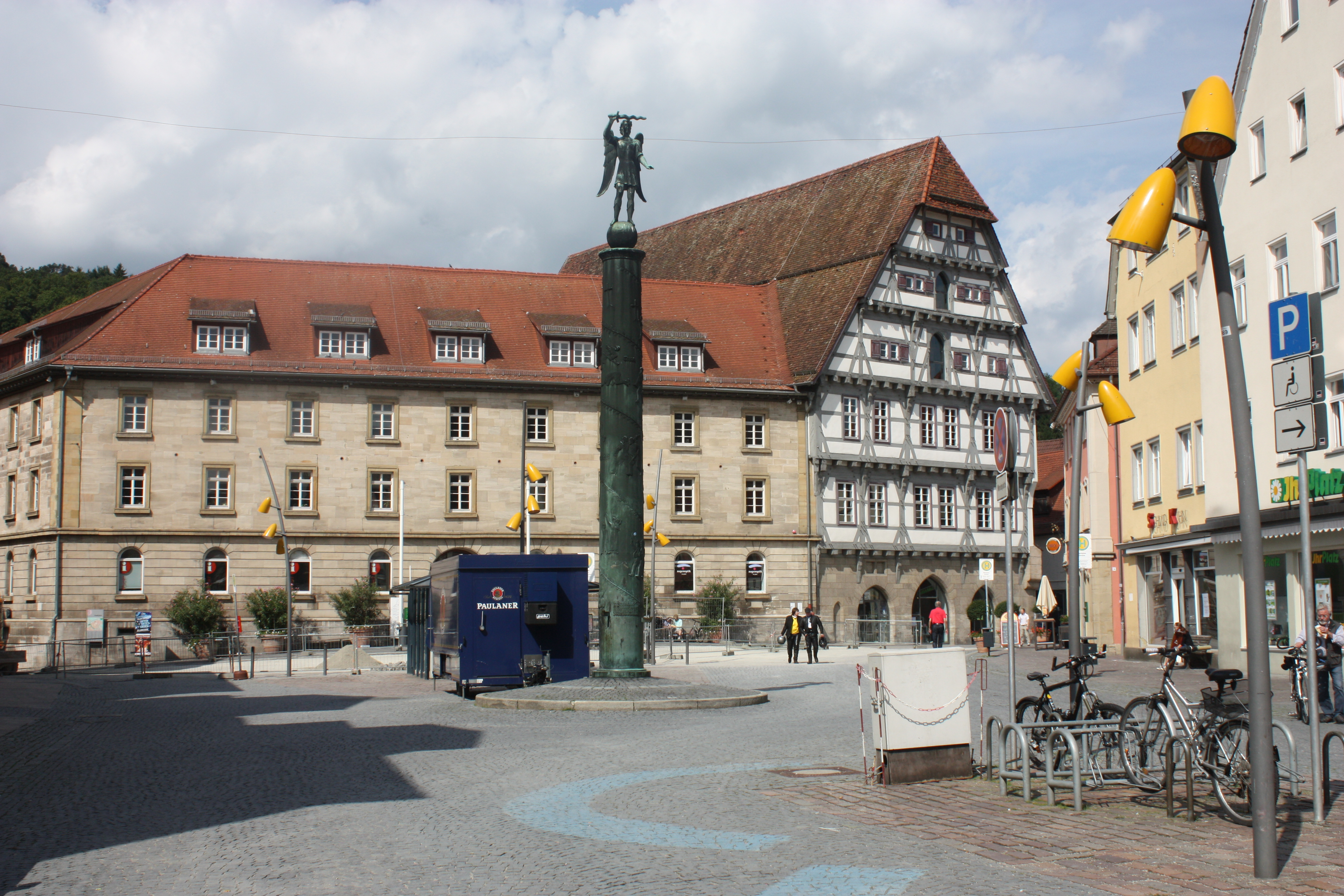 Spital am nördlichen Ende des Schwäbisch Gmünder Marktplatz.